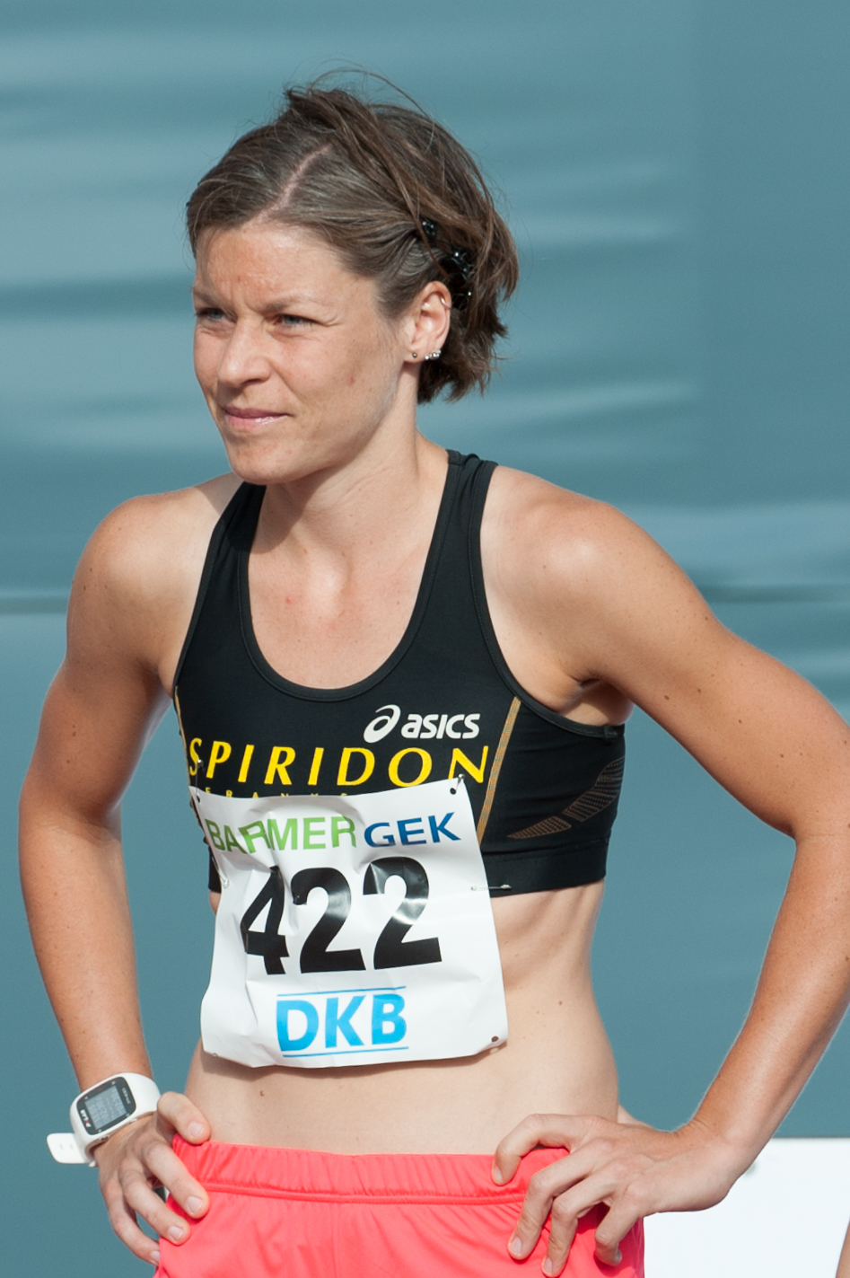 Deutsche Leichtathletik-Meisterschaften 2015: Frauen 5000m - Tinka Uphoff, Spiridon Frankfurt